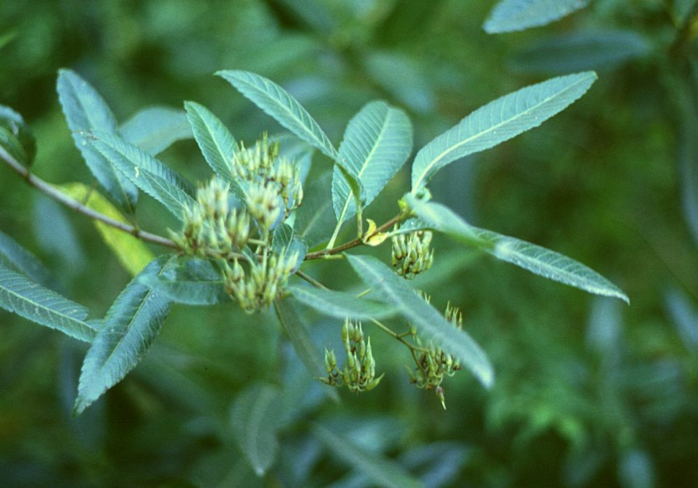 Caldcluvia paniculata, Cunoniaceae - Chile, Ostufer des Sees Lago Llanquihue N Ensenada (Prov. de Llanquihue)